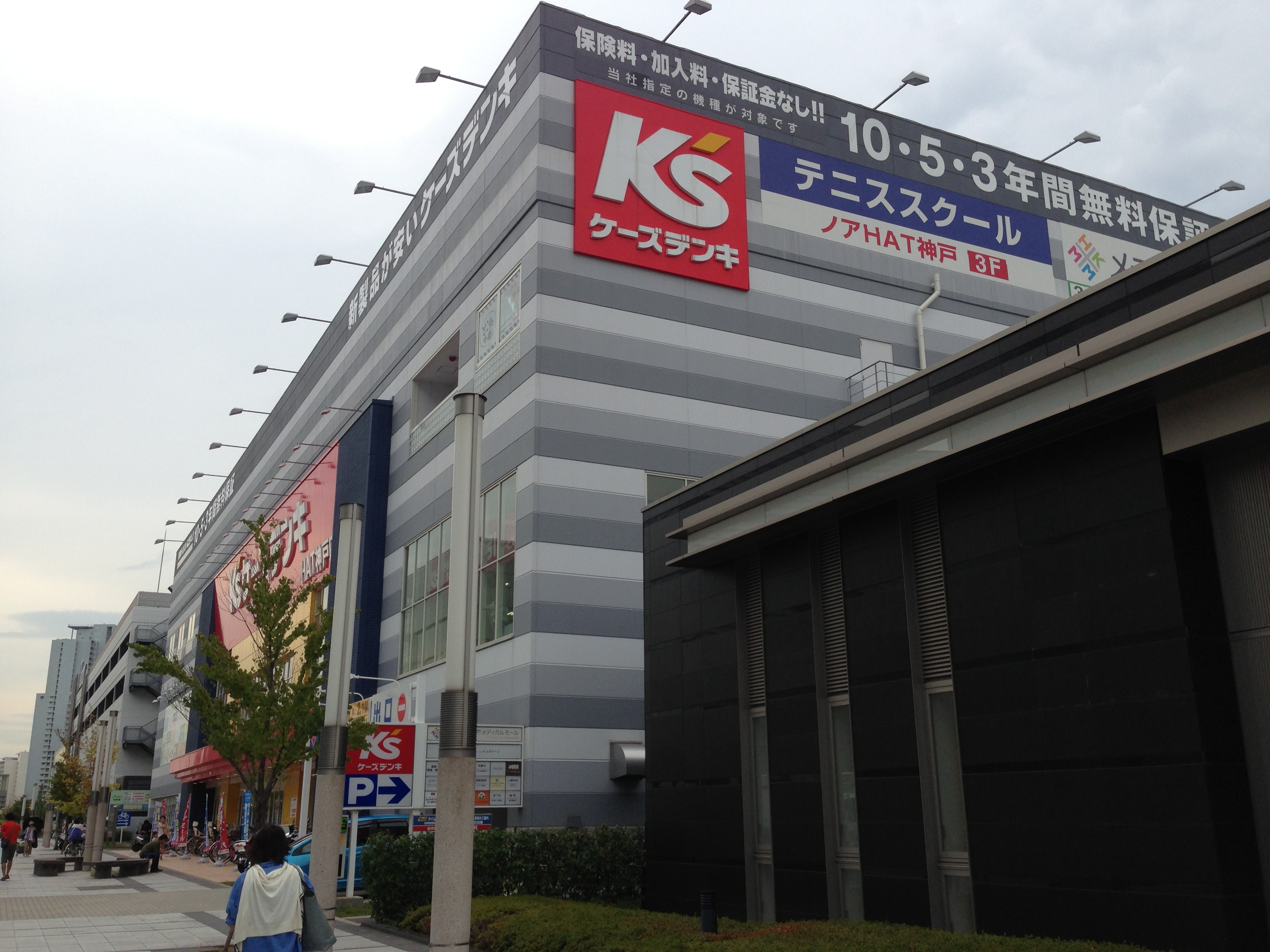 Noah Indoor Stage HAT Kobe テニススクール・ノア HAT神戸校 〒651-0073 兵庫県神戸市中央区脇浜海岸通2-2-3